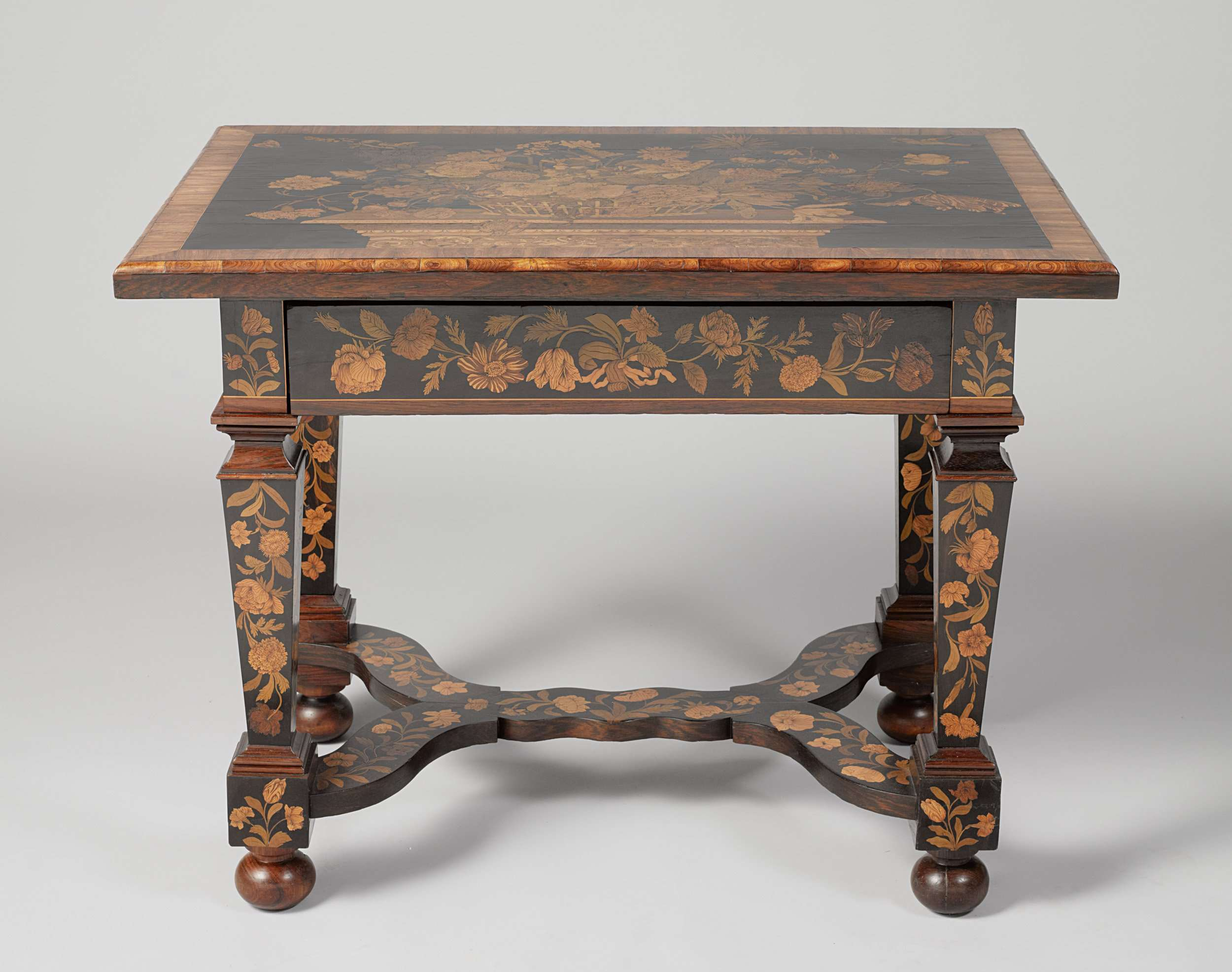 Tafel belijmd met konings-, ebbe-, palissander- en esdoornhout en andere houtsoorten op een eikenhouten kern. De balustervormige poten zijn door een geslingerd dubbel Y-vormig kruis verbonden. Alle oppervlakken zijn met bloemenmarqueterie gevuld. Het blad vertoont een breed uitgemeten bloemenmand op een tafel, versierd met een fries, gevuld met door bandwerk verbonden bladvoluten, waartussen een zwaan en een andere vogel. In de linker- en rechterbovenhoek een vlinder en vogel.; Iconclasscode: 48A98333; Iconclasscode: 25F711(BUTTERFLY); Iconclasscode: 25F36(SWAN)